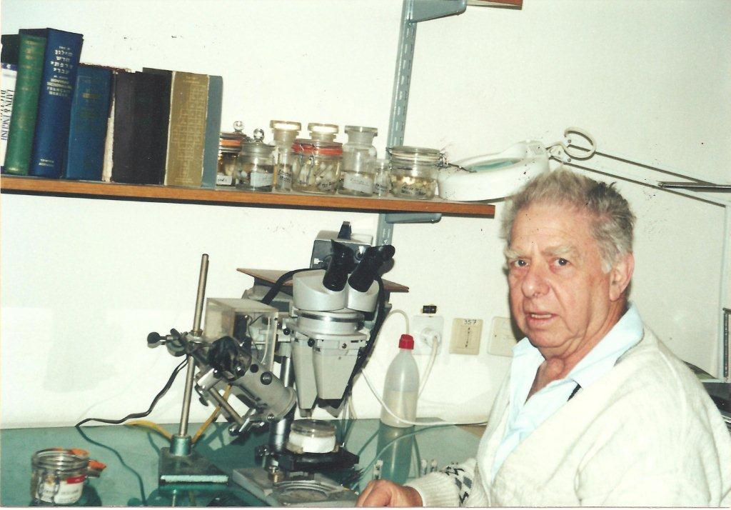 דר גרשם לוי - תמונה לערך בויקיפדיה2